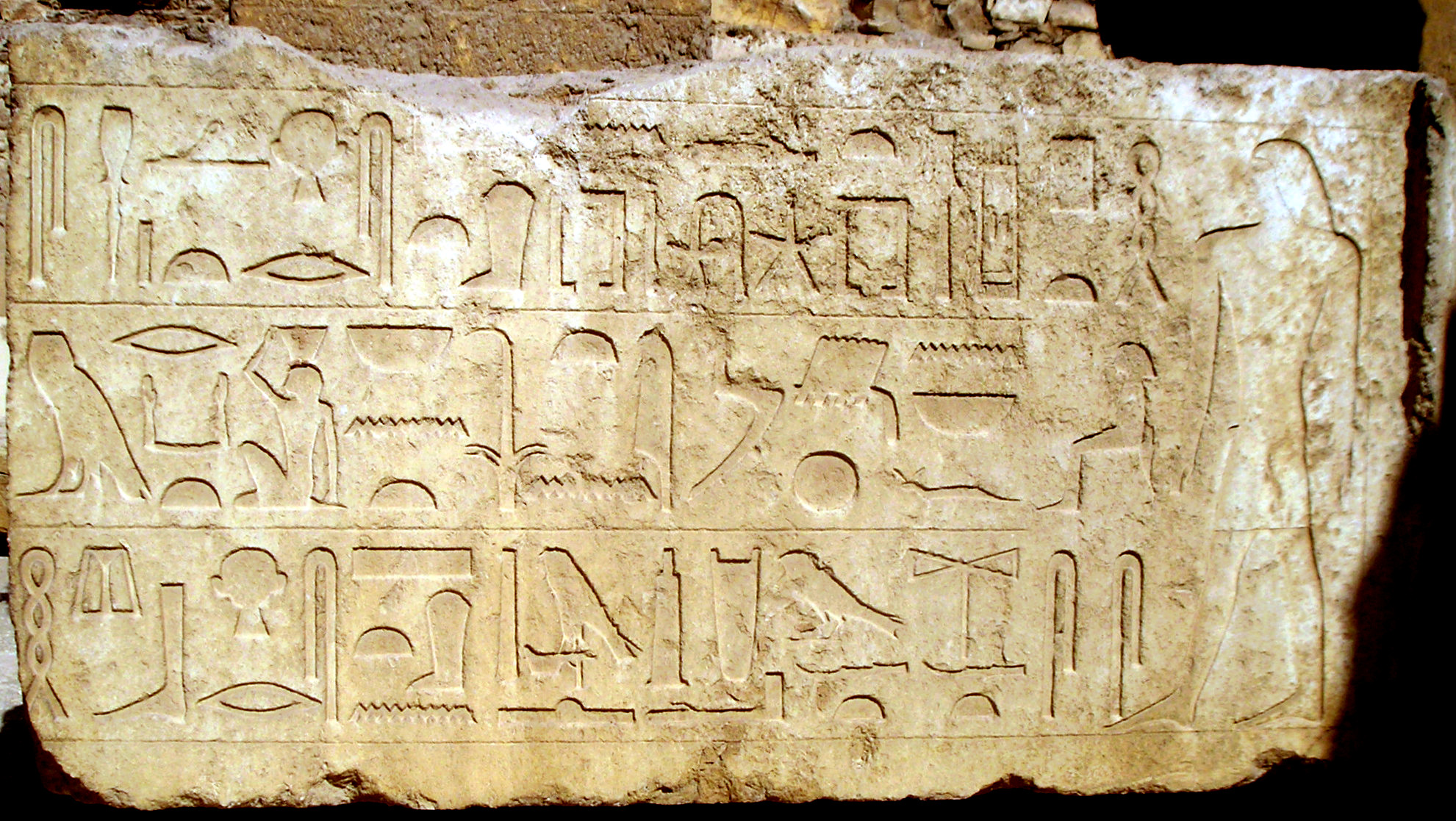 Relief du mastaba de Ptahchepsès.